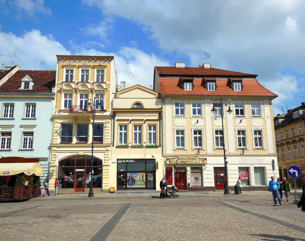 Wschodnia pierzeja Starego Rynku w Bydgoszczy